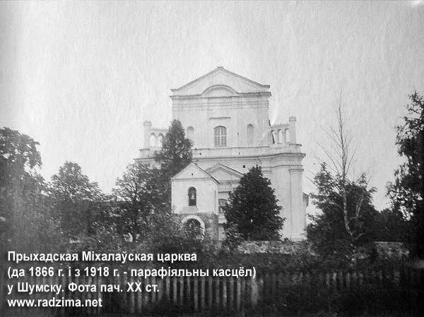 Беларуская (тарашкевіца): Шумск (Šumsk). Касьцёл